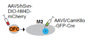 OFC→M2